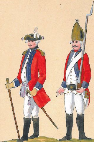 35. Regiment Grenadierów (Wittena)